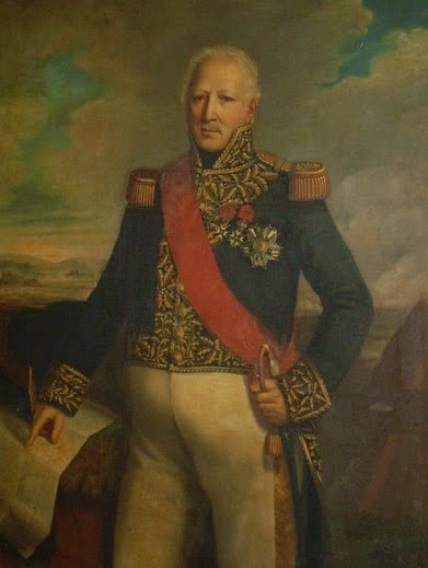 Étienne Heudelet de Bierre (1770-1857), général de division et comte de l'Empire.